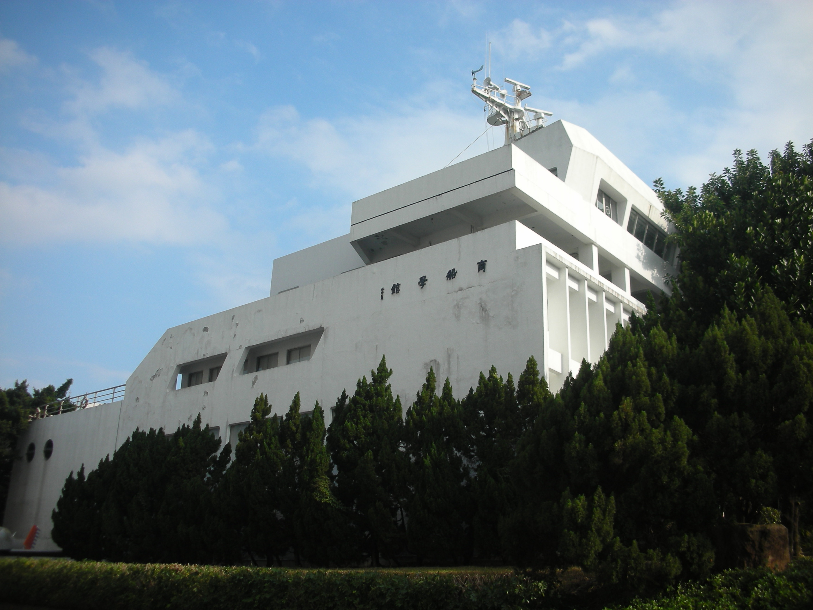 淡江大學海事博物館，保存前身「商船學館」字樣。